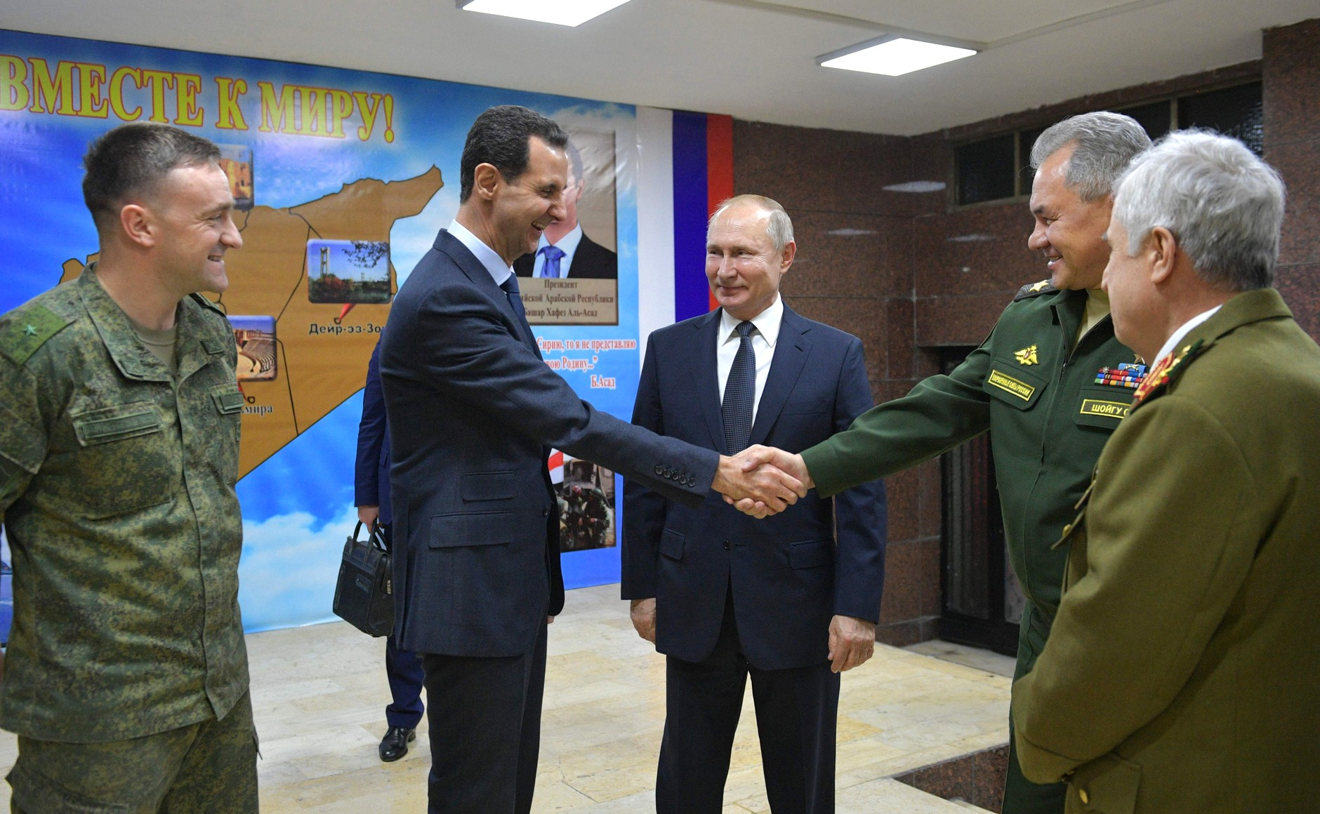 Владимир Путин посетил командный пункт группировки Вооружённых Сил России в Сирии. С Президентом Сирийской Арабской Республики Башаром Асадом (слева) и Министром обороны Сергеем Шойгу.